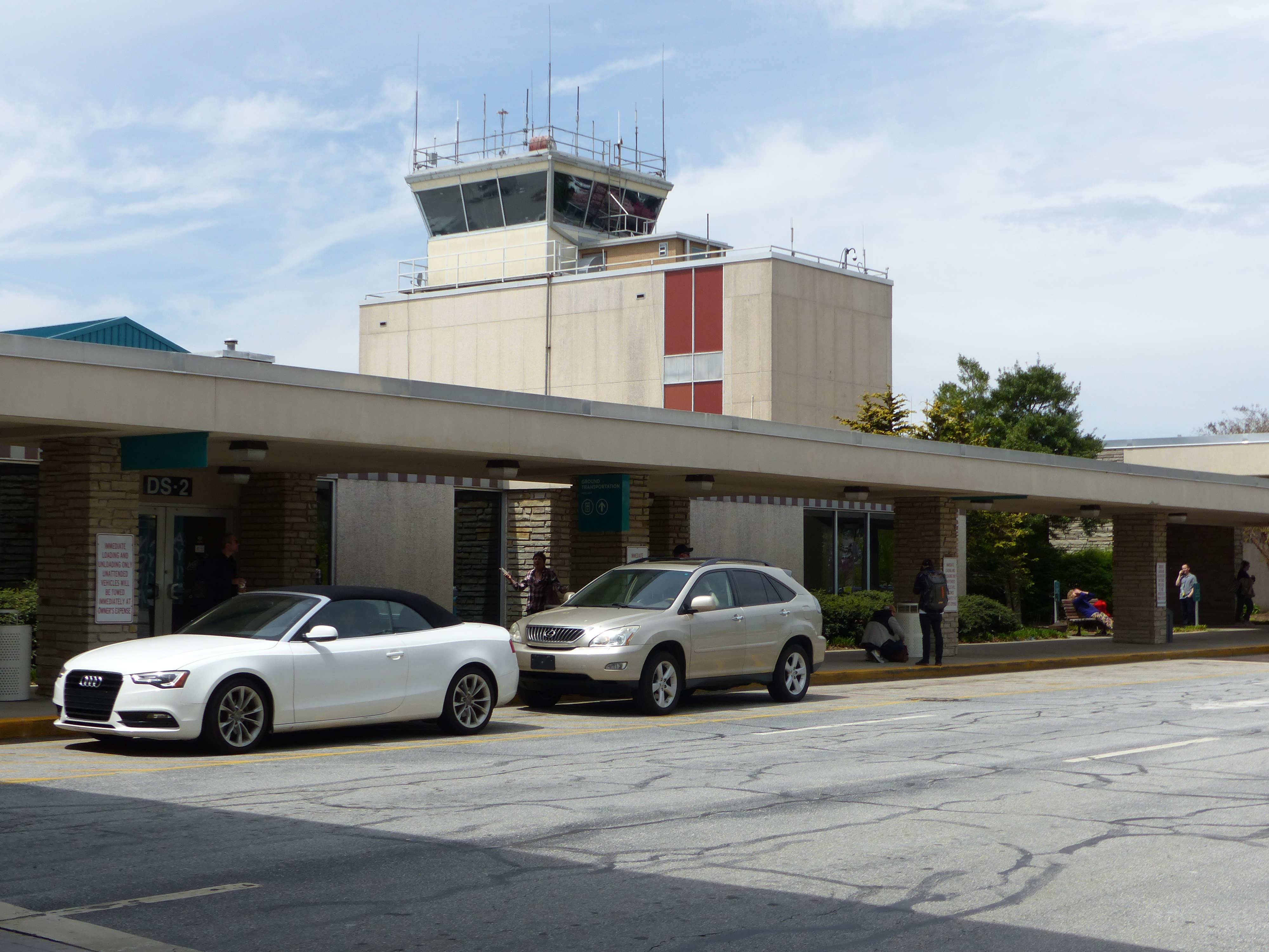 Außenansicht